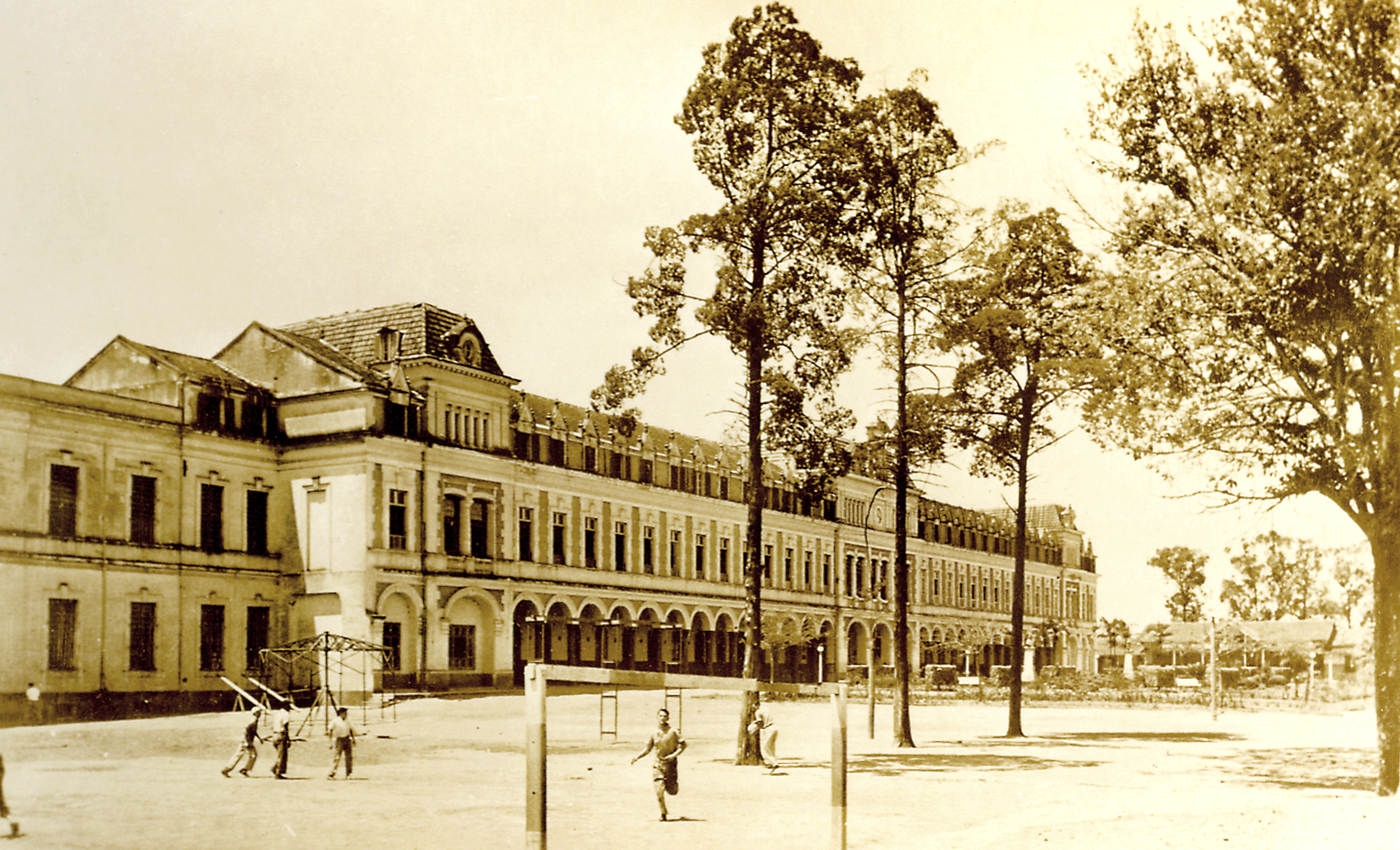 Obra que integra o acervo do Museu Paulista da USP. Coleção Werner Haberkorn